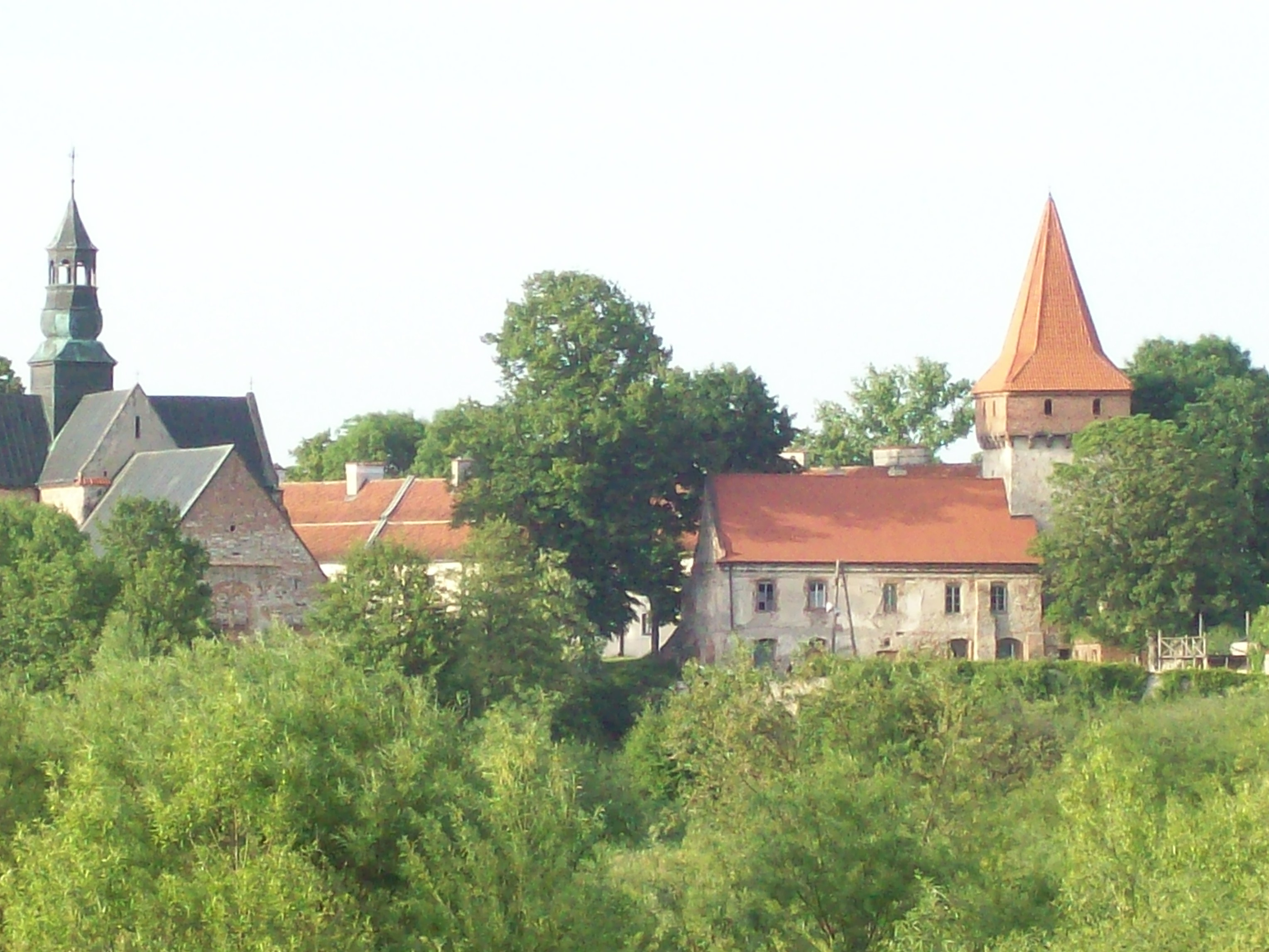 Baszta Opactwa Cysterskiego na Podklasztorzu (w Sulejowie). Widok od wału.